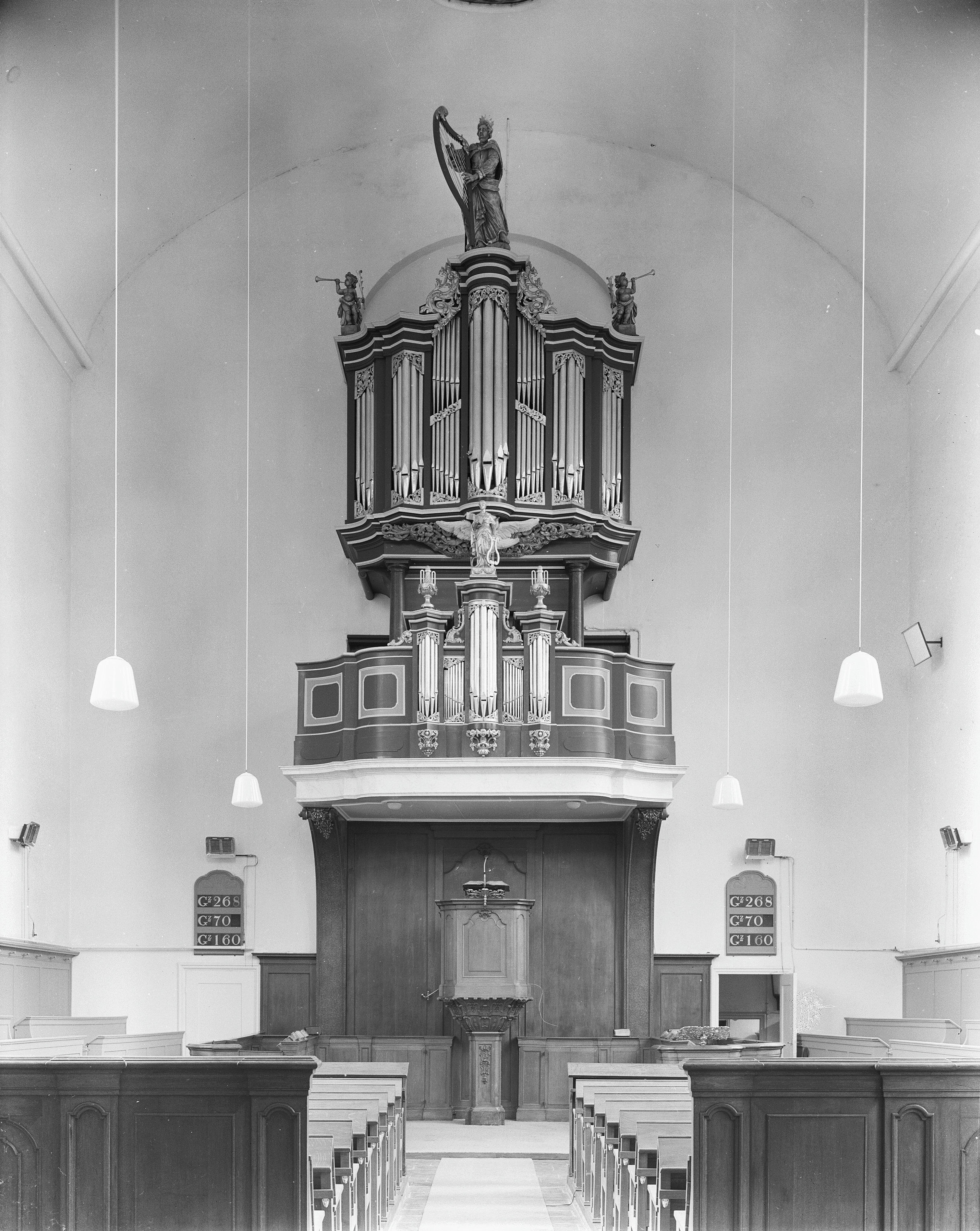 Lutherse Kerk: orgel en preekstoel